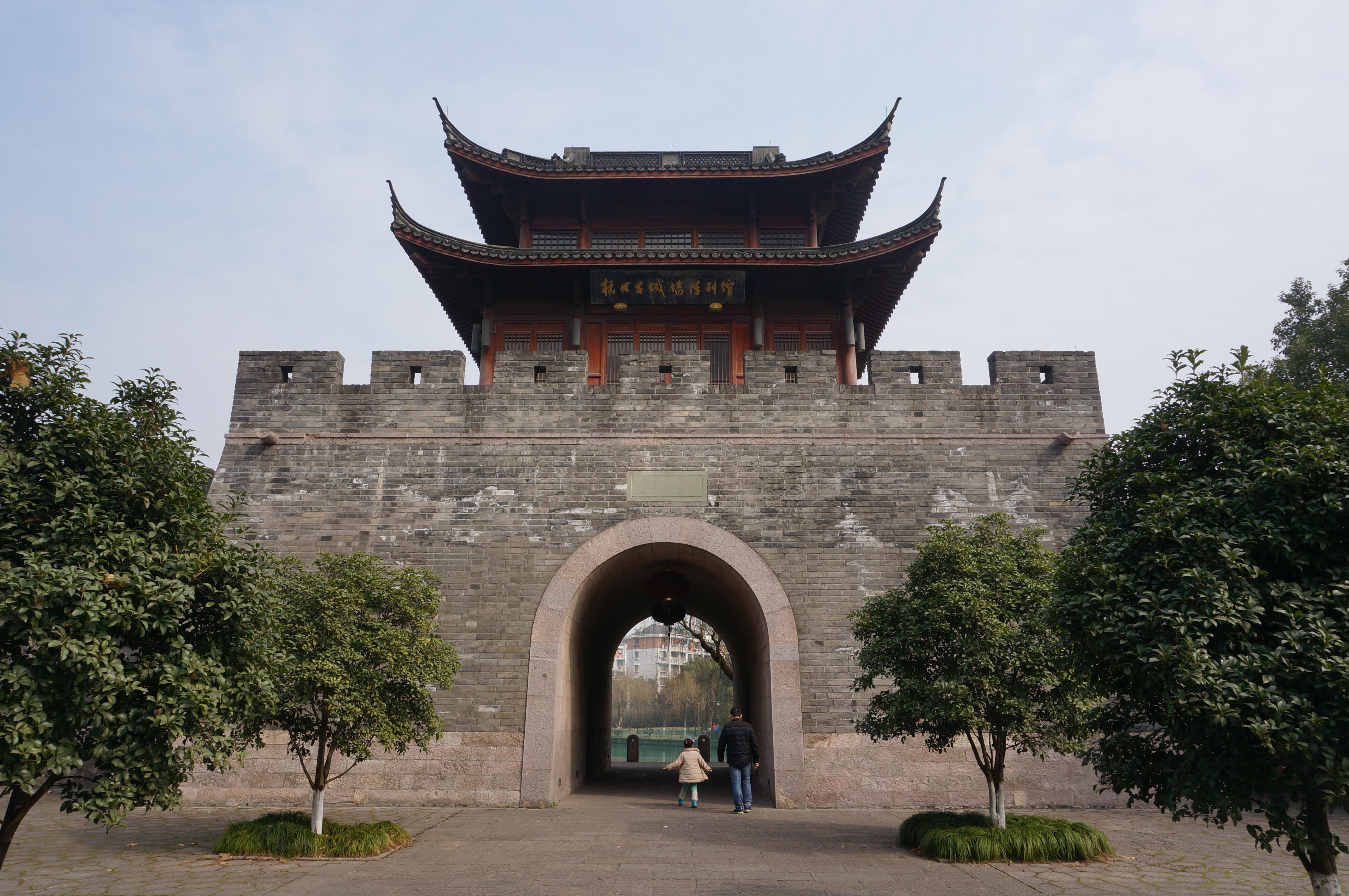 杭州庆春门（重建，今杭州古城墙陈列馆），西侧。